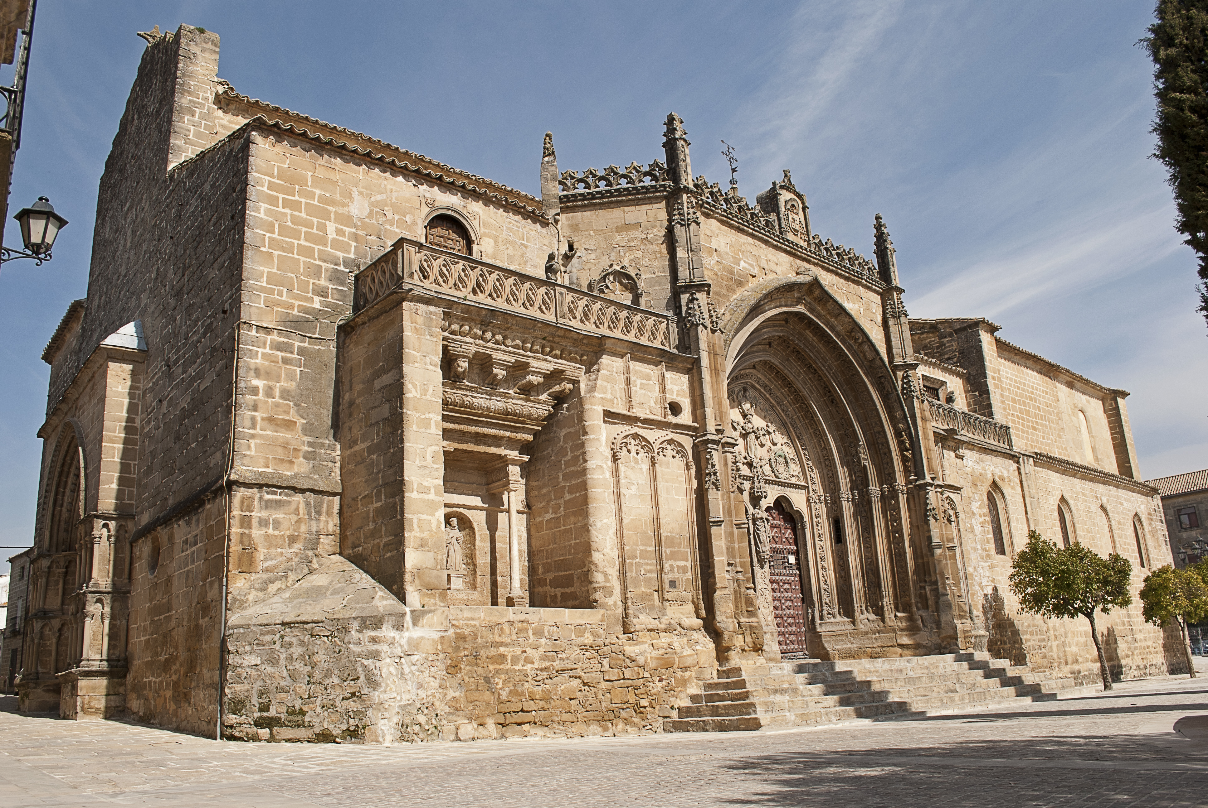 Iglesia de San Pablo de Úbeda.